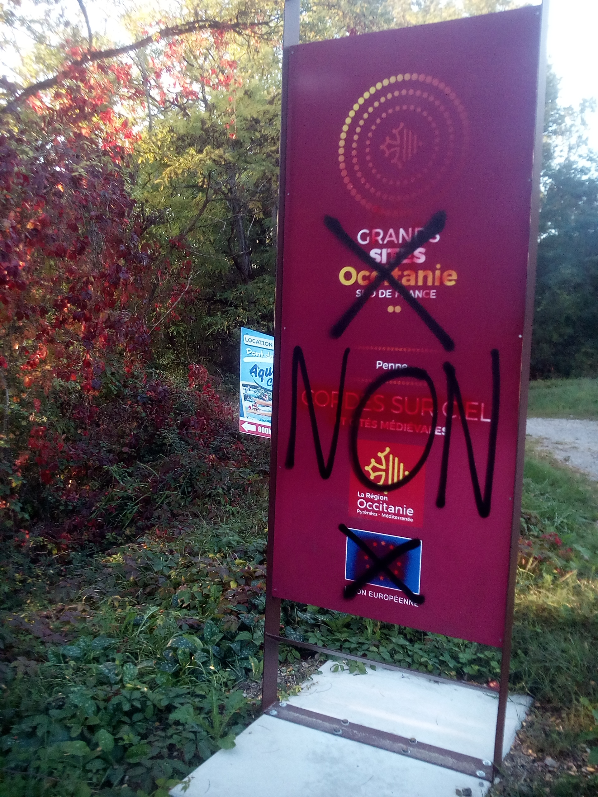 Totem du label Grand Site Occitanie décerné par la Région Occitanie puis tagué en signe de contestation